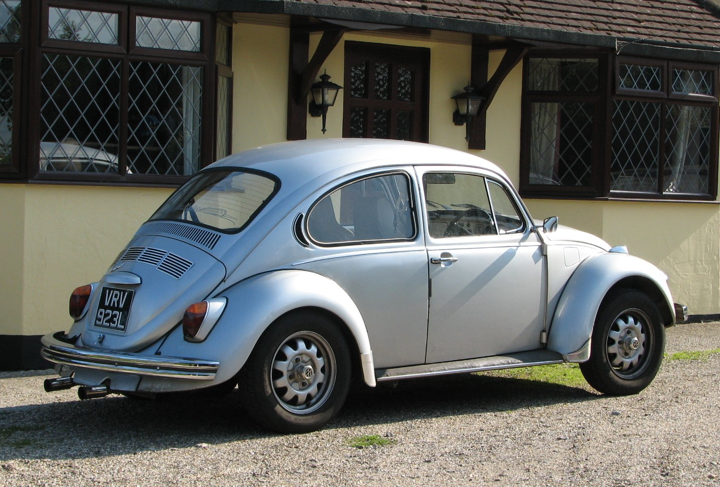 1971 Volkswagen Type 1 "Beetle".